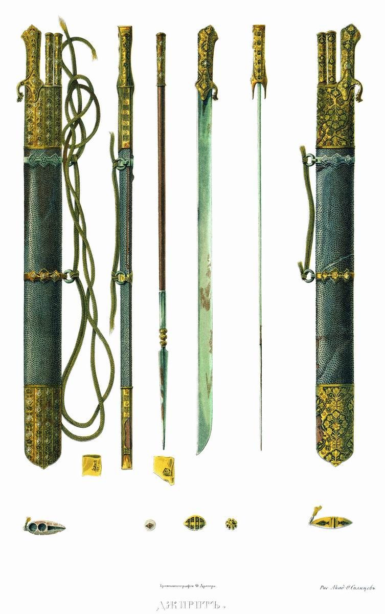 Джерид. Из описи: «Джид в деревянном, обтянутом черным хзом, влагалище, с чеканною серебряною, местами золоченою с чернью оправою, заключающем в себе два стальных трехгранных метательных копьеца, на деревянных ратовищах, и саблю»